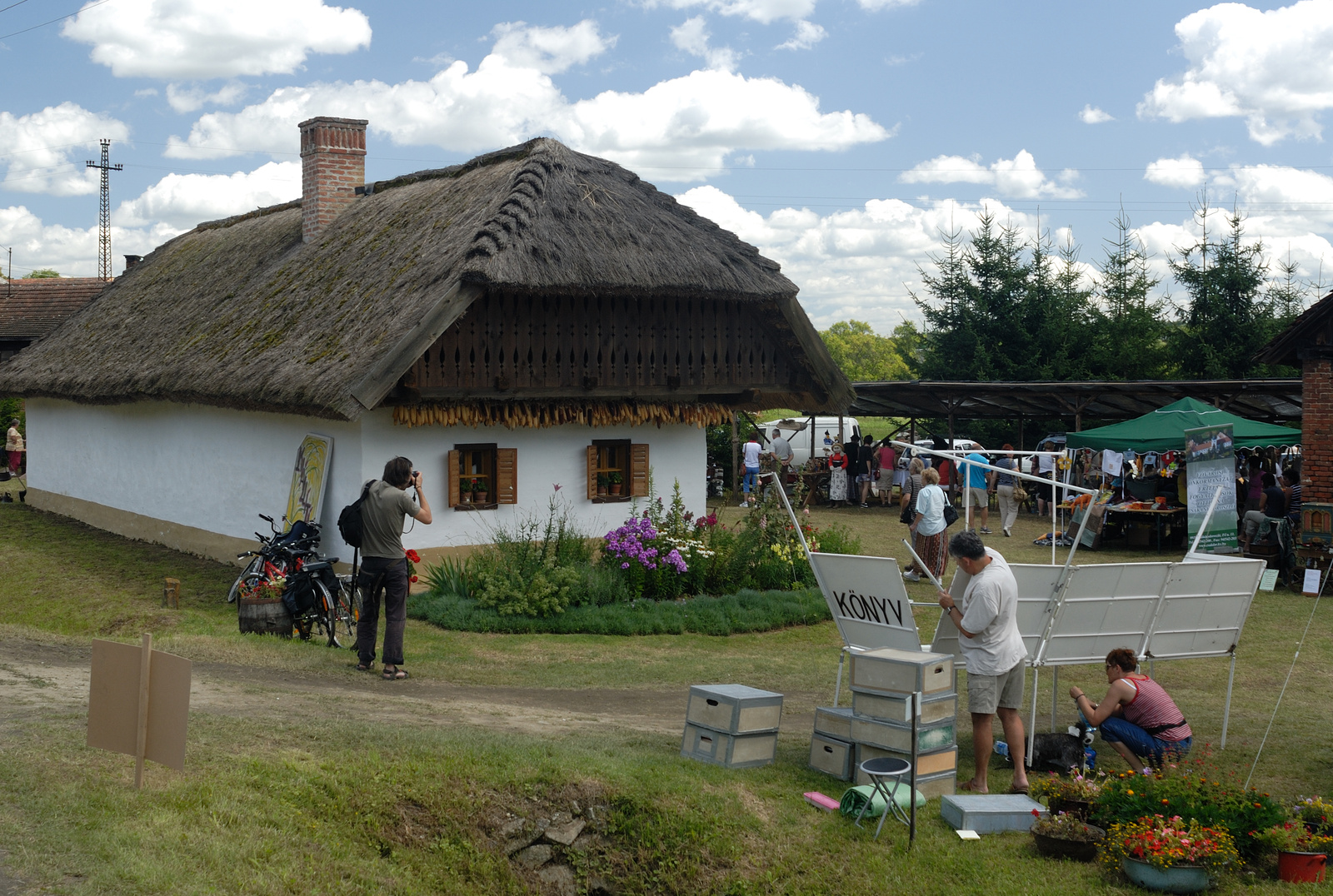 Lakóház (Nagyrákos, Alsószer 18.) This is a photo of a monument in Hungary, Identifier: 18246